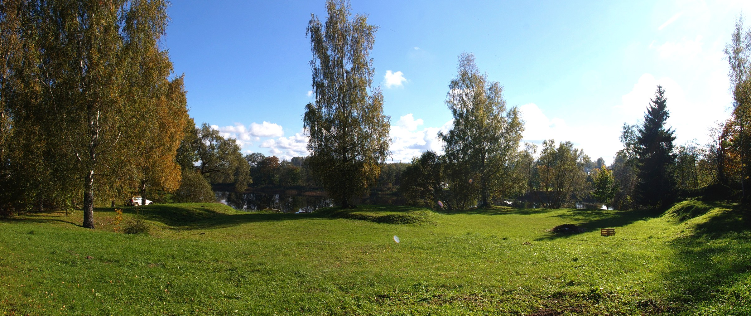 Kiviaja asulakoht. Asukoht: Pärnu maakond, Sauga vald, Pulli küla